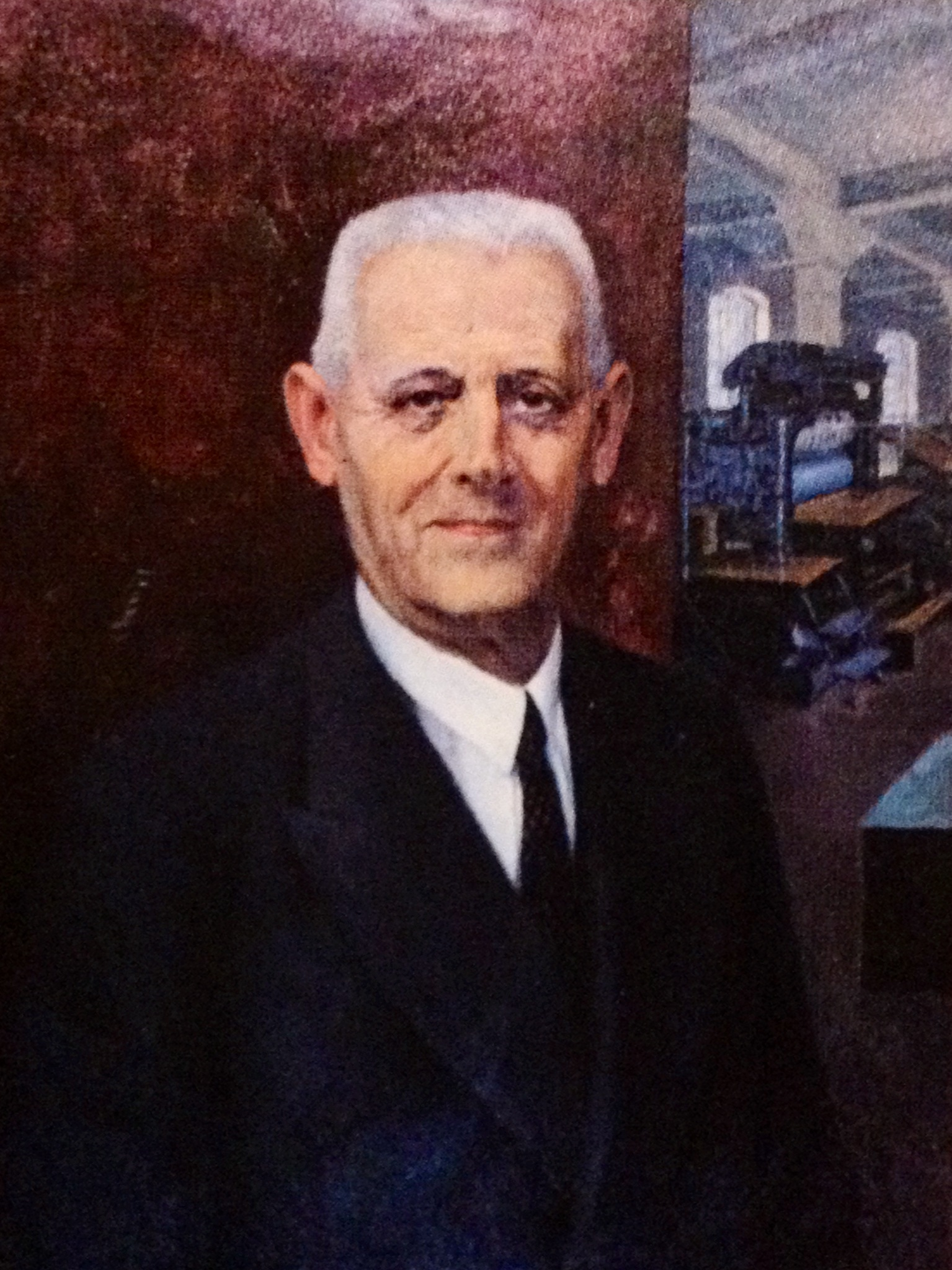 Foto del ritratto di Paolo Marzari.